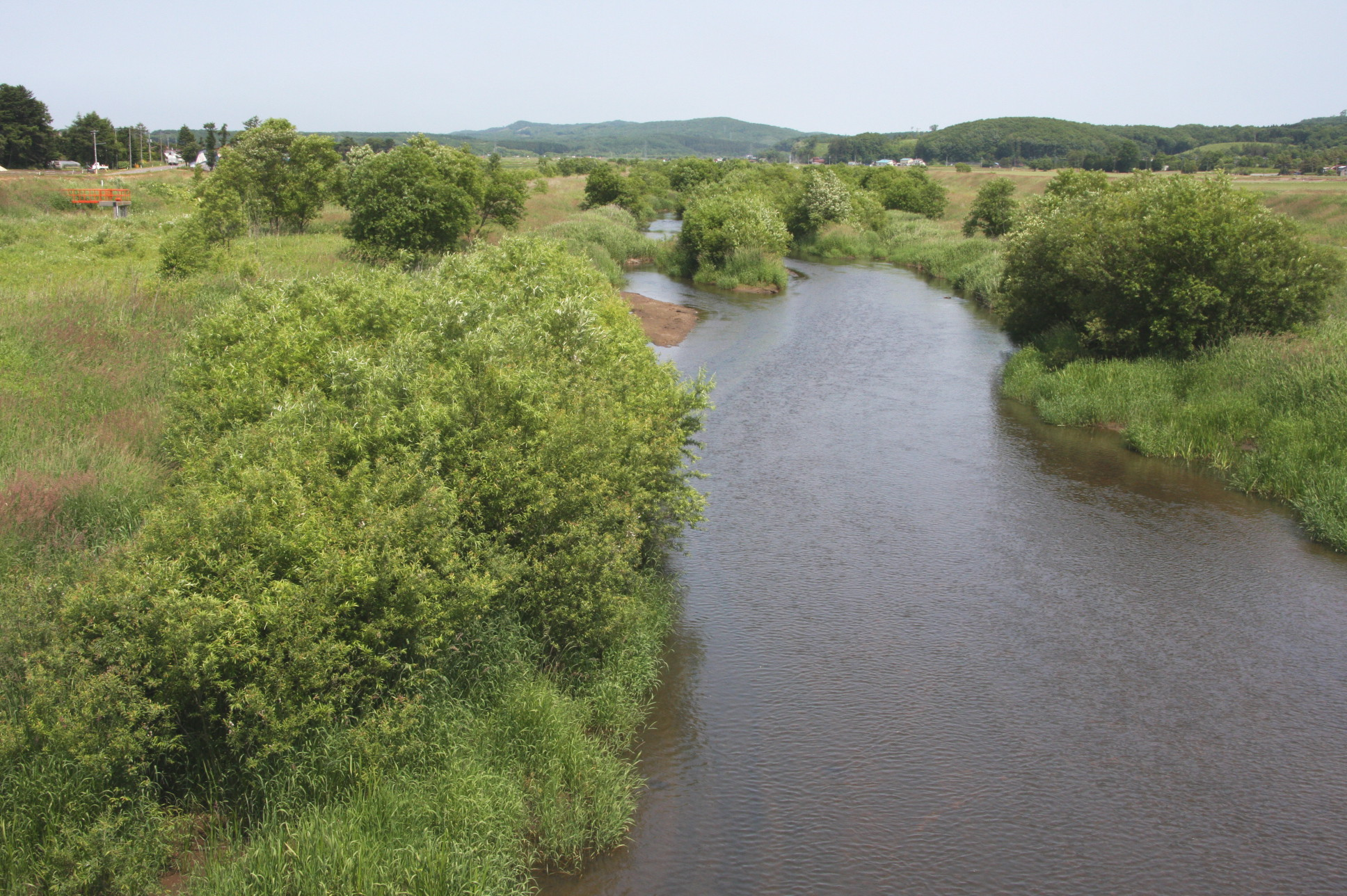 安平川（安平町遠浅） 源武橋より上流を望む